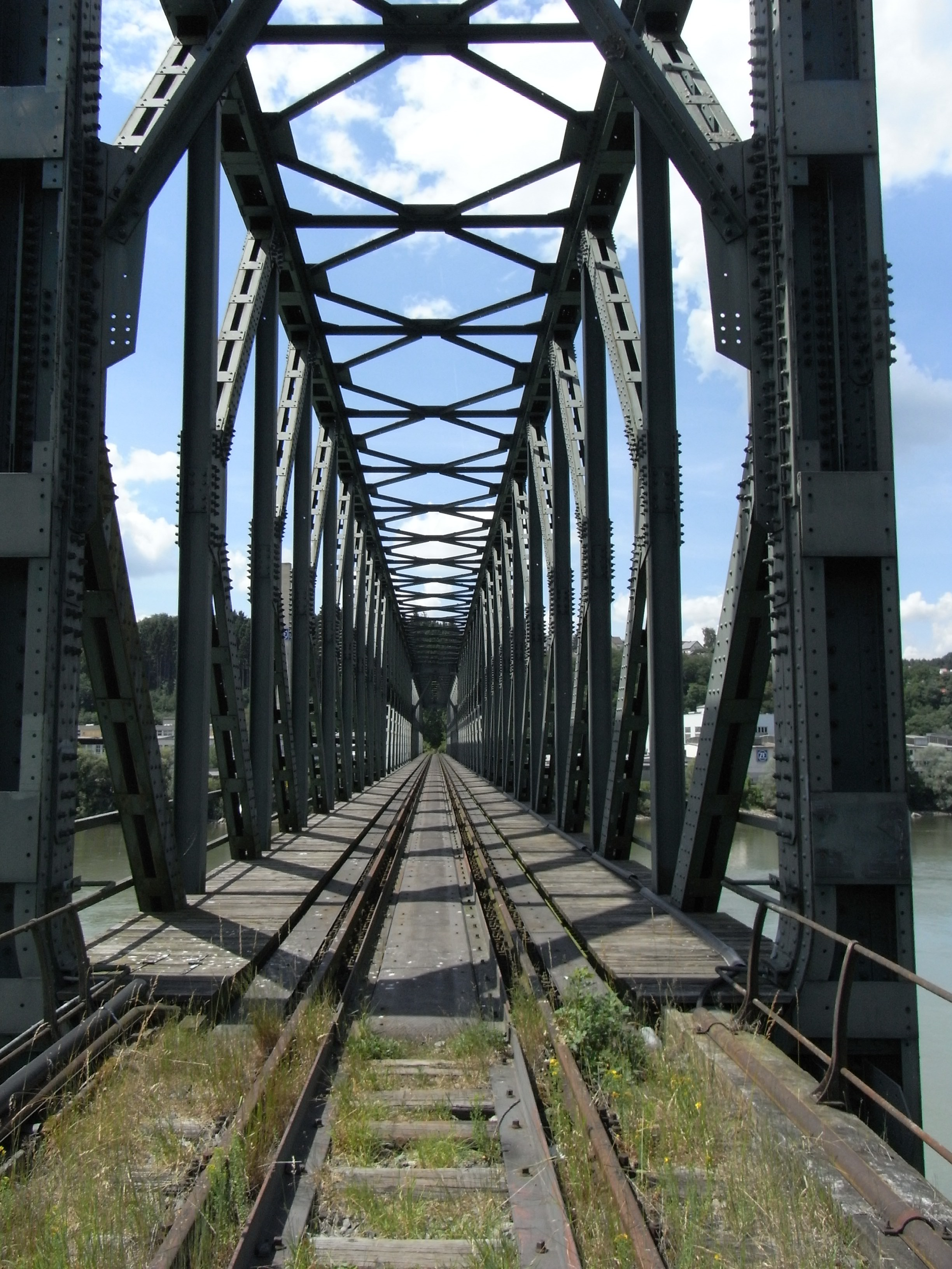 Kräutelsteinbrücke über die Donau, Blick vom Südufer durch den Brückenkasten